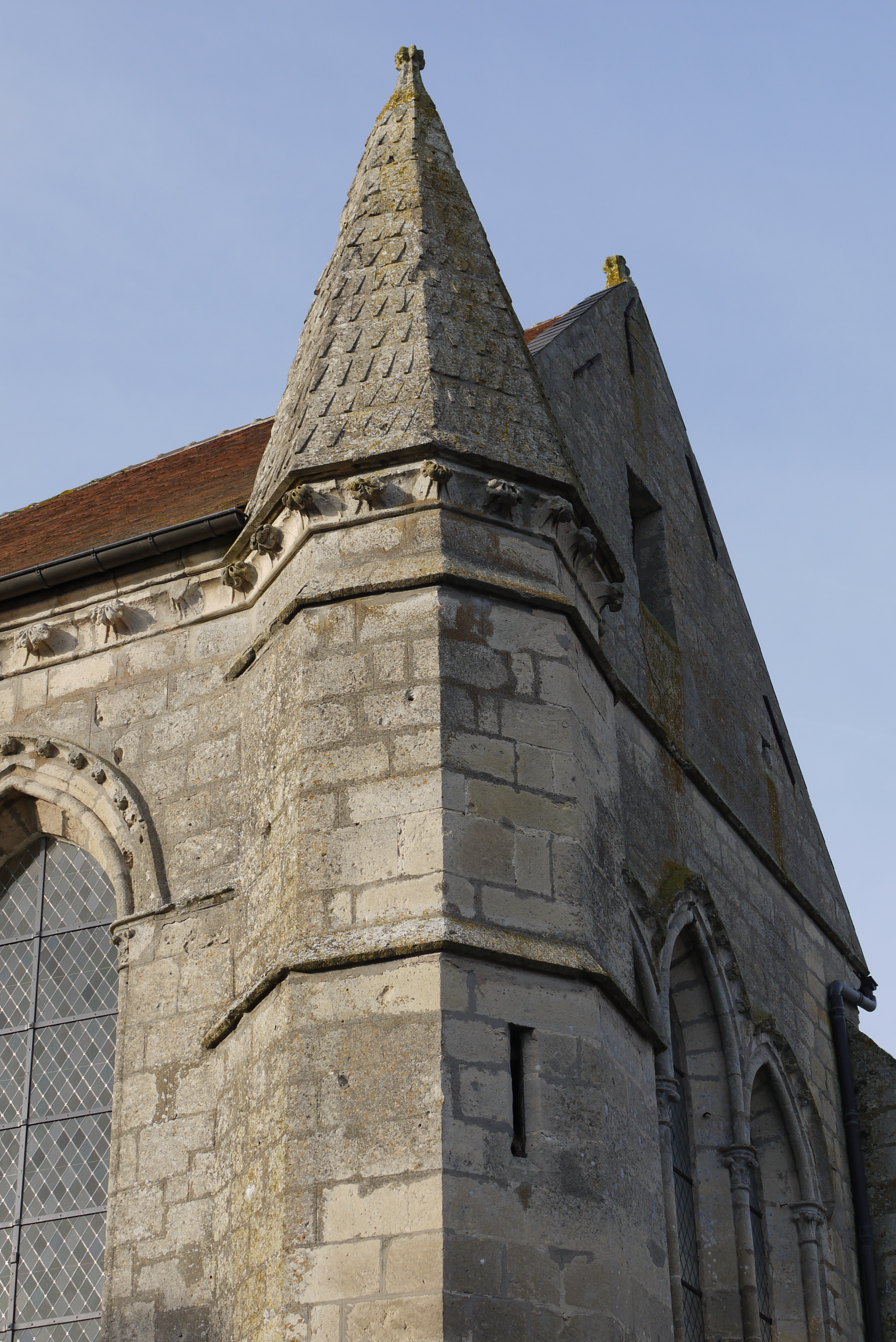 Détail de l'église Saint-Jean-Baptiste de Priez (Aisne)